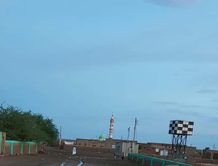 صوره حقيقة للقرية